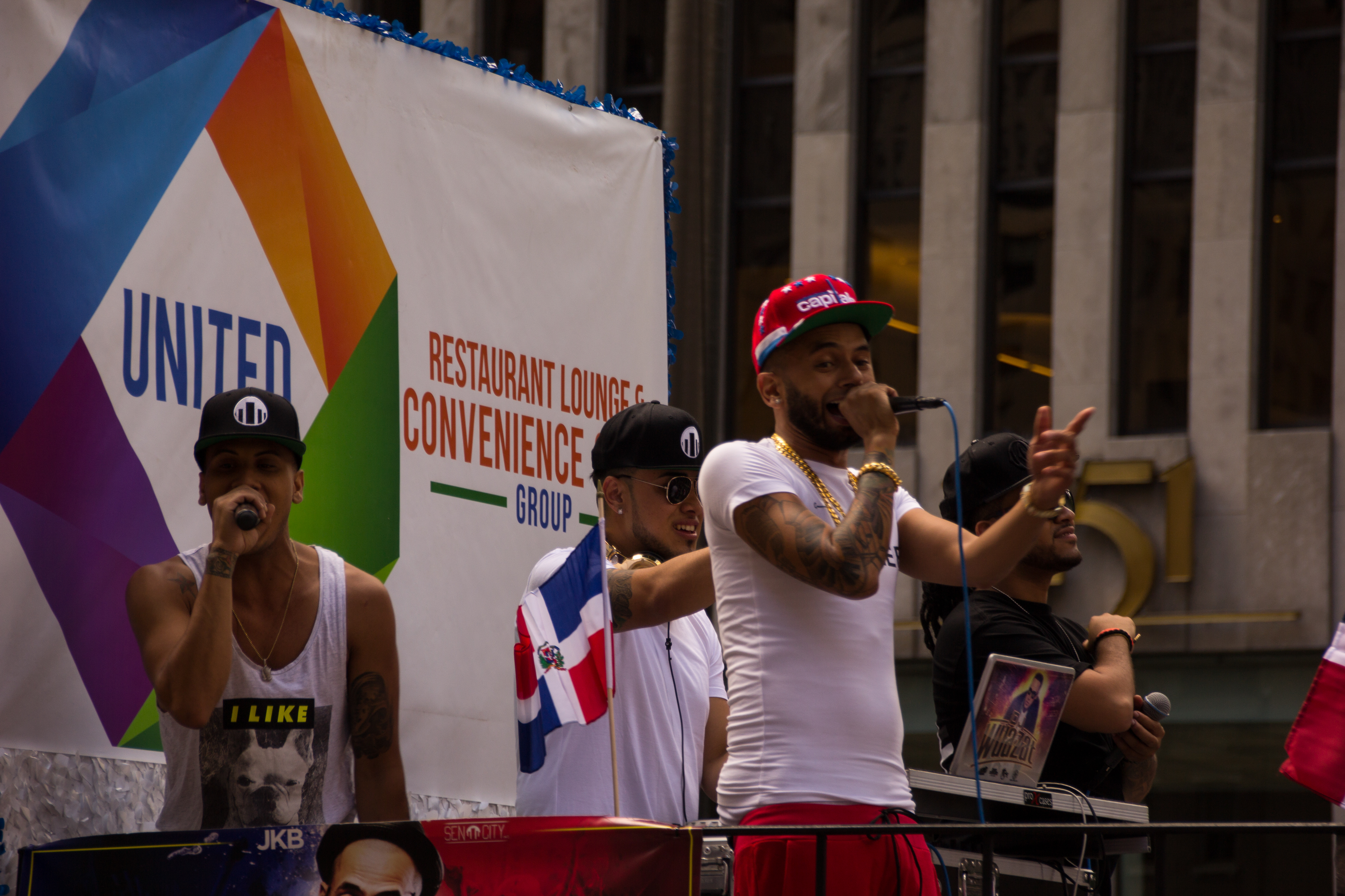 dominican parade 2015